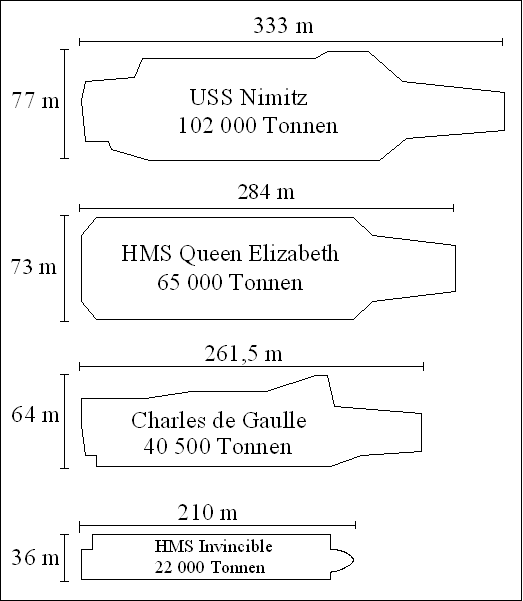 Schematischer Größenvergleich zwischen den Flugzeugträgern Nimitz (USA), Queen Elizabeth (GB), Charles de Gaulle (F) und Invincible (GB)